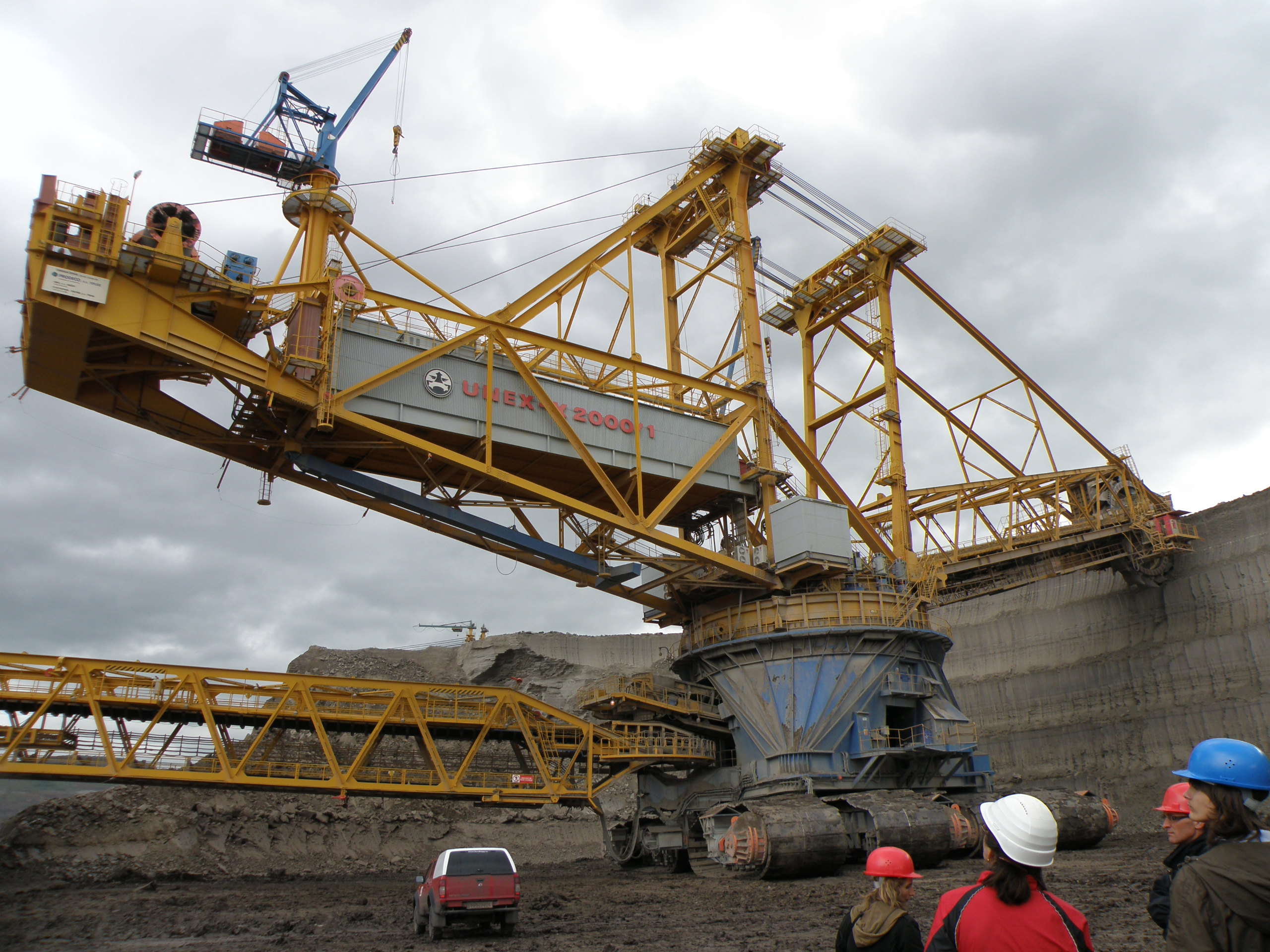 Kolesové rypadlo na skrývku, celý stroj, 2009.